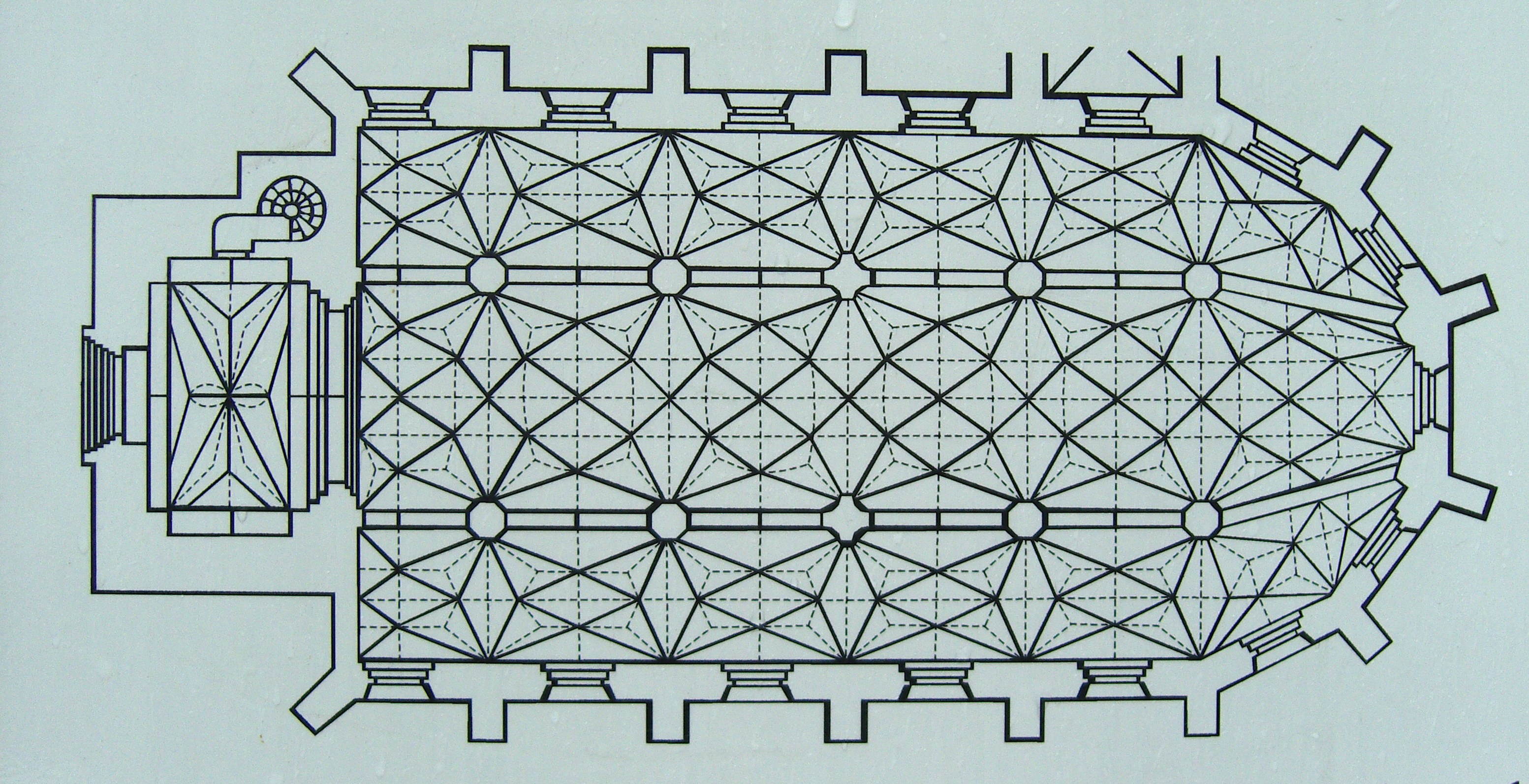 Grundriss der evangelischen Peter-und-Paul-Kirche in Senftenberg (Informationstafel vor der Kirche abfotografiert - Panoramafreiheit)